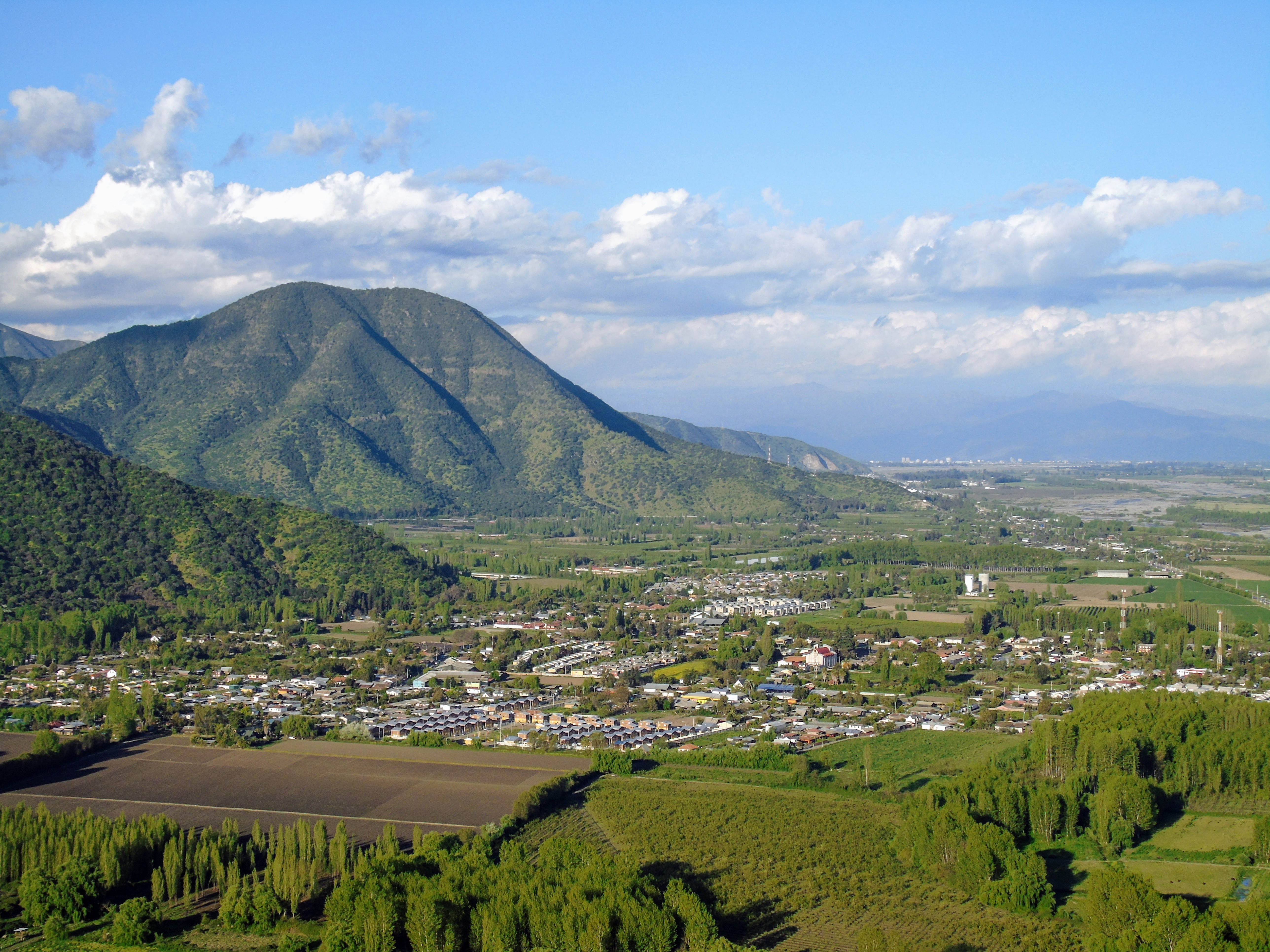 doñihue